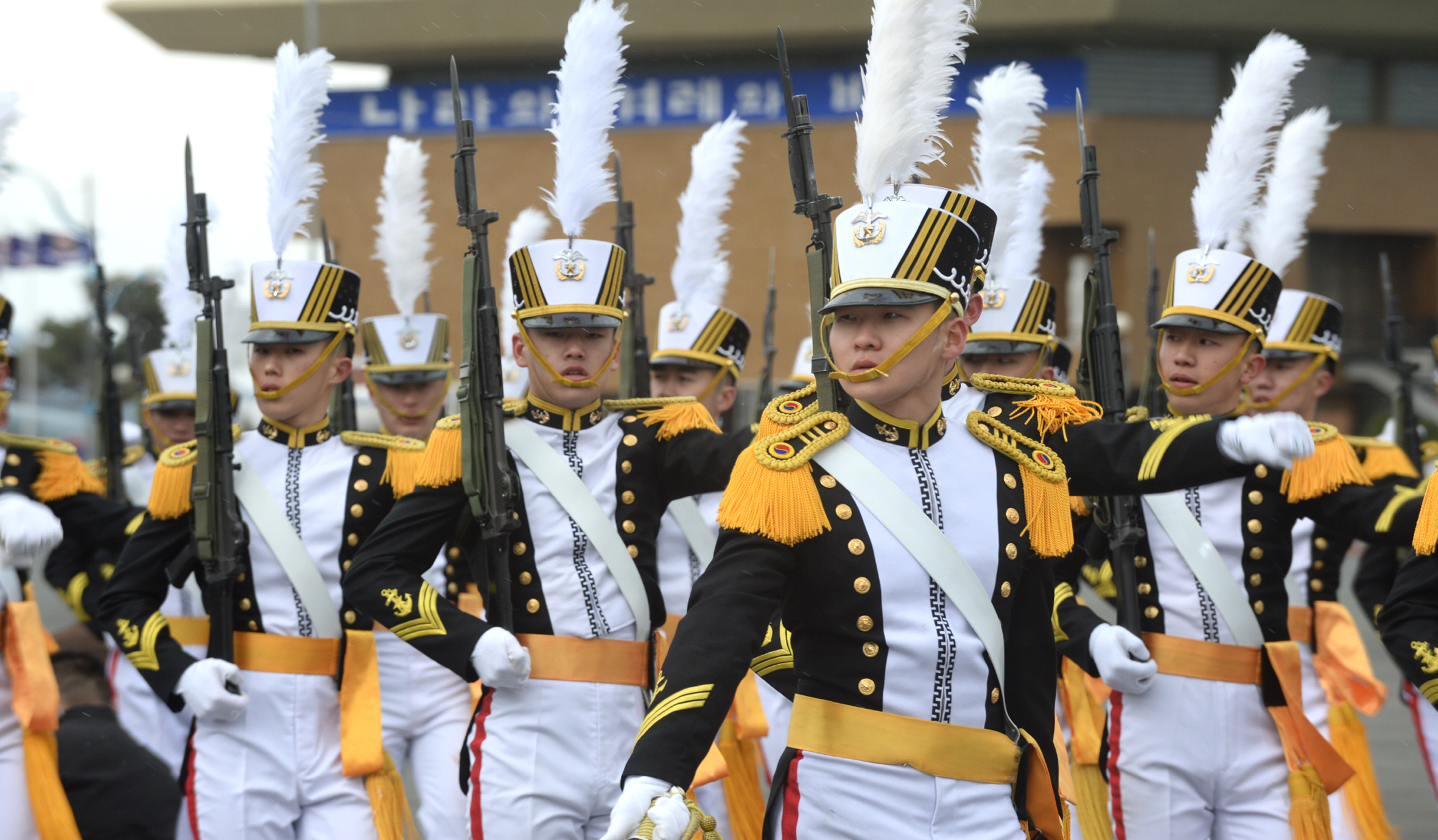 제72기 해군사관생도 입교식이 지난 14일 해군사관학교 연병장에서 거행됐다. 157명(남 143명, 여 14명, 외국인 수탁생 4명 포함)의 제72기 신입생도들은 지난 1월10일부터 5주간의 가입교 훈련을 마친 뒤 이날 정식 사관생도로 입교했다. 촬영자 : 이명수